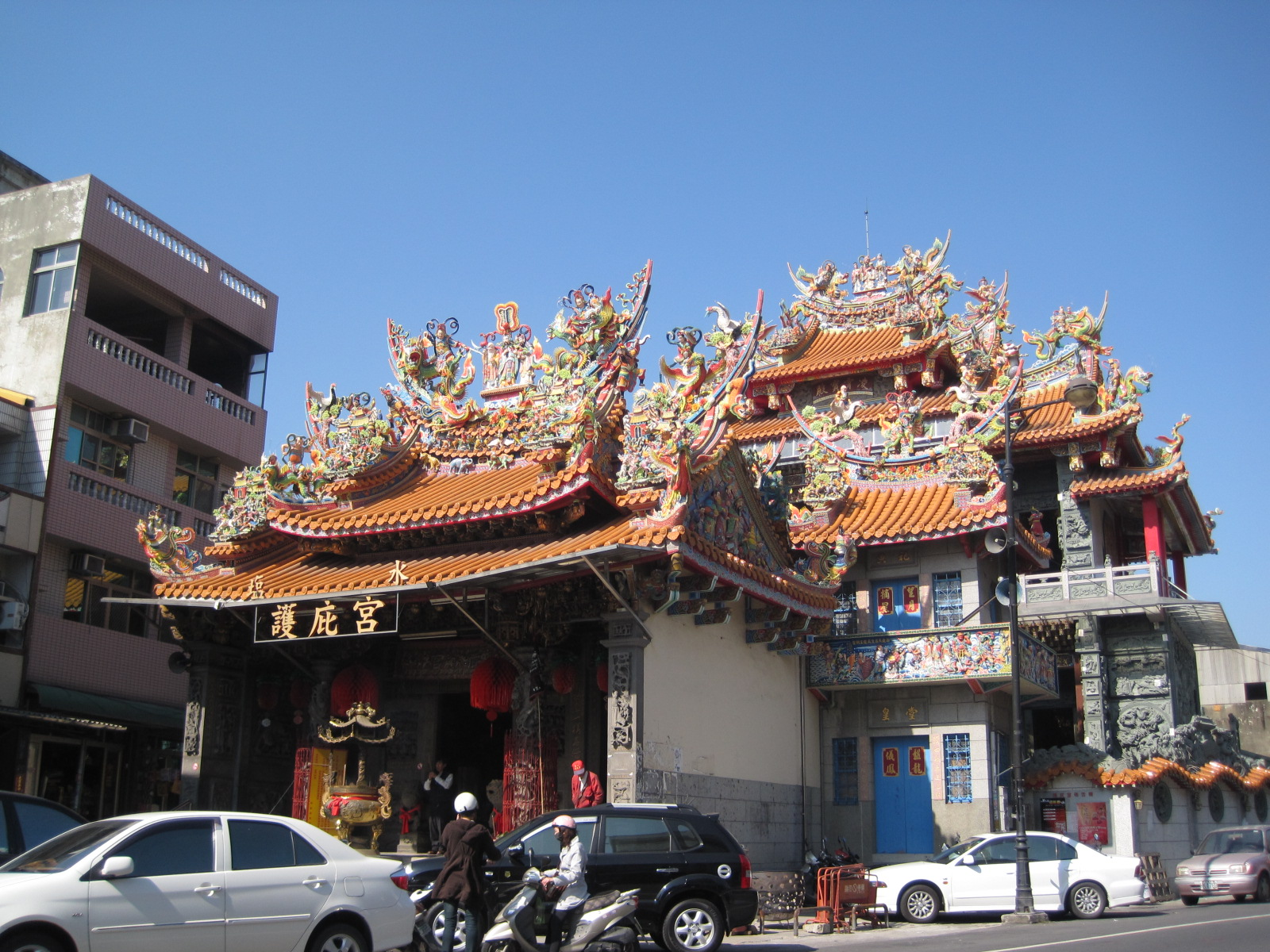 鹽水護庇宮